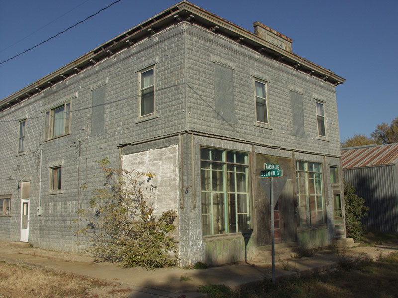 Niagara, North Dakota. From .